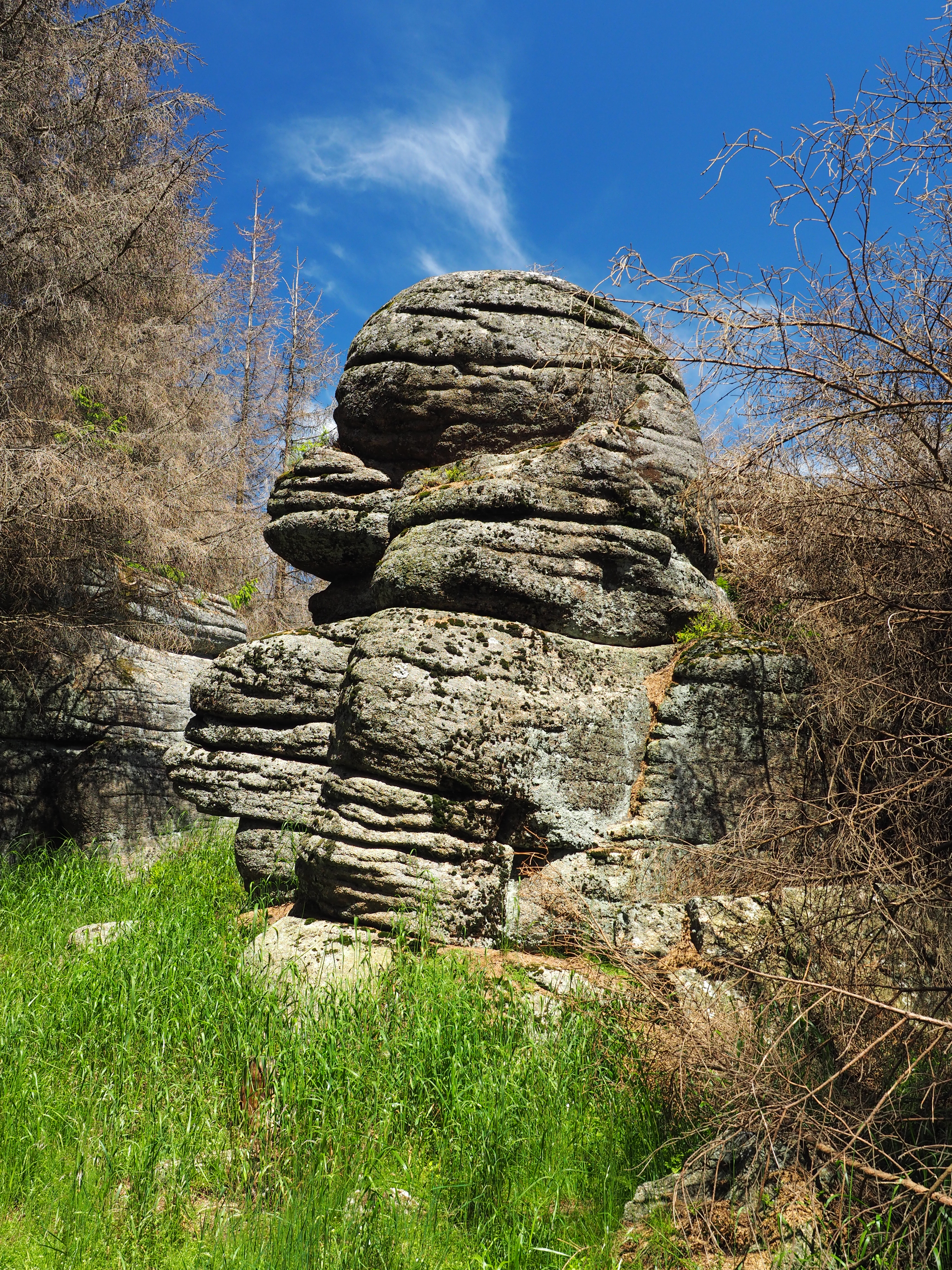 Die Brockenkinder sind eine Felsengruppe aus Granit auf dem Renneckenberg im FHH-Gebiet DE-4229-301 „Hochharz“ und im Nationalpark Harz.